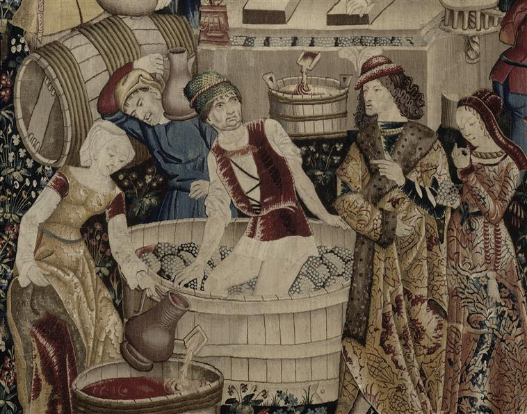 Description : Scène de vendanges vers 1500 - Tapisserie laine soie Photo RMN - Jean-Gilles Berizzi - Paris, musée national du Moyen Âge - Thermes de Cluny